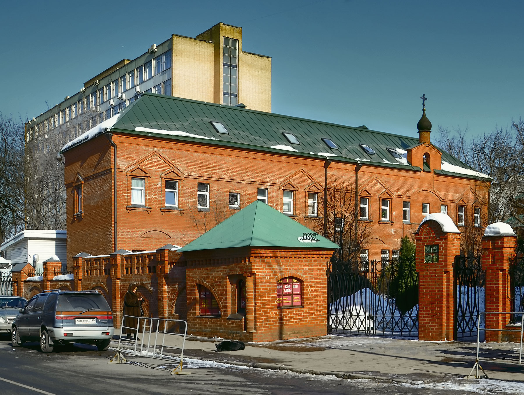 Домовый храм преподобномученицы Великой Княгини Елисаветы Феодоровны при церкви Митрофана, епископа Воронежского. Москва, 2-я Хуторская ул., 40.